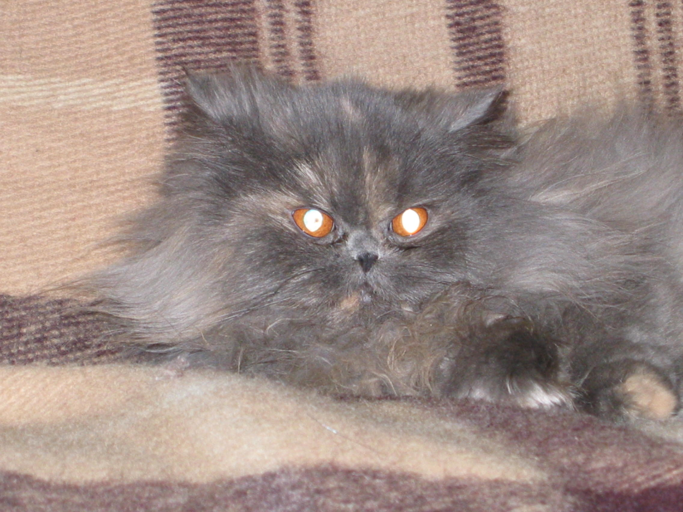 Кошка